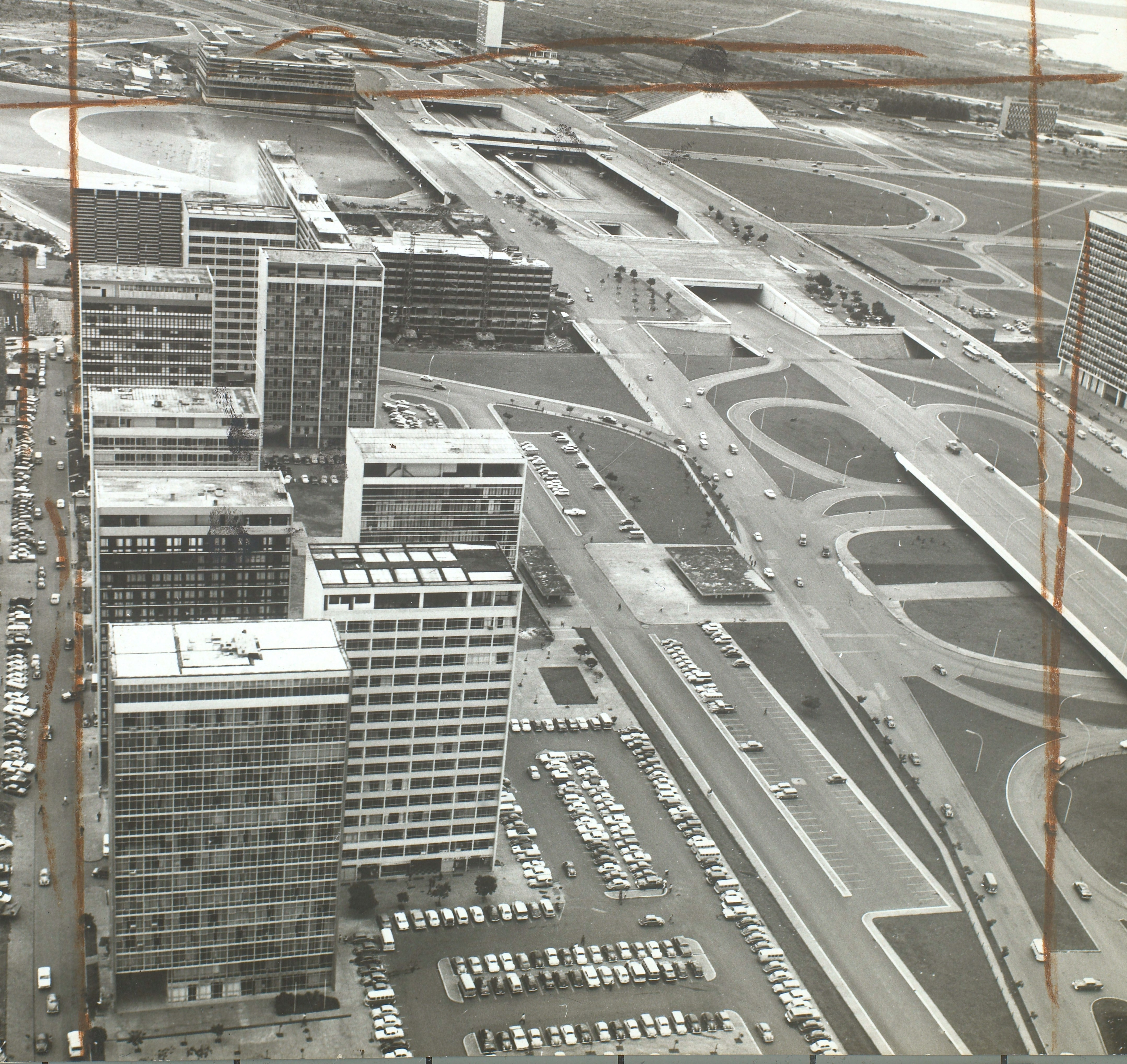 Fotografia do Fundo Correio da Manhã, sob a guarda do Arquivo Nacional.